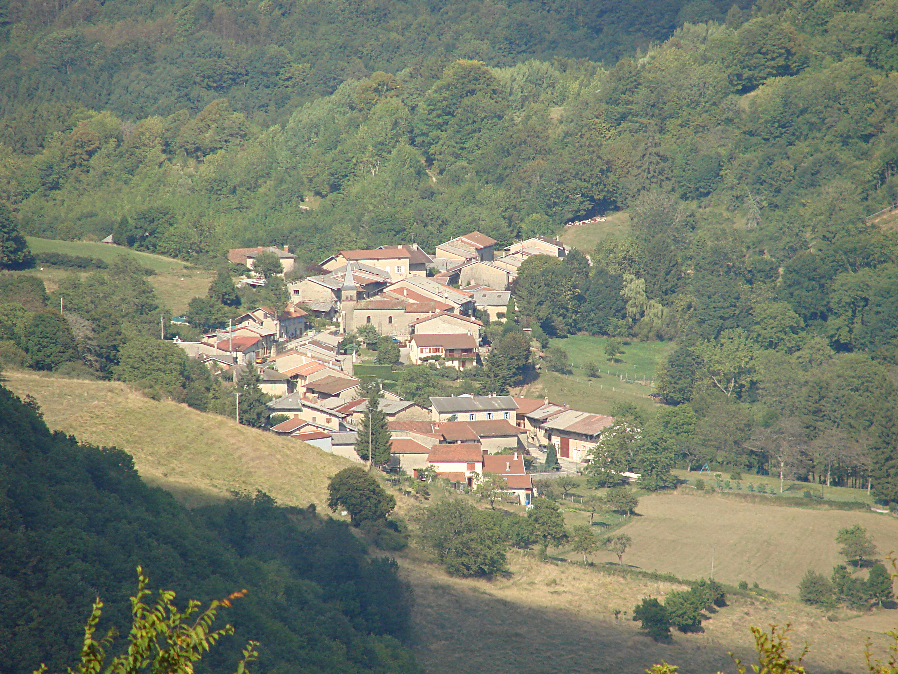 Le village de Nivollet vue du Mont Luisandre